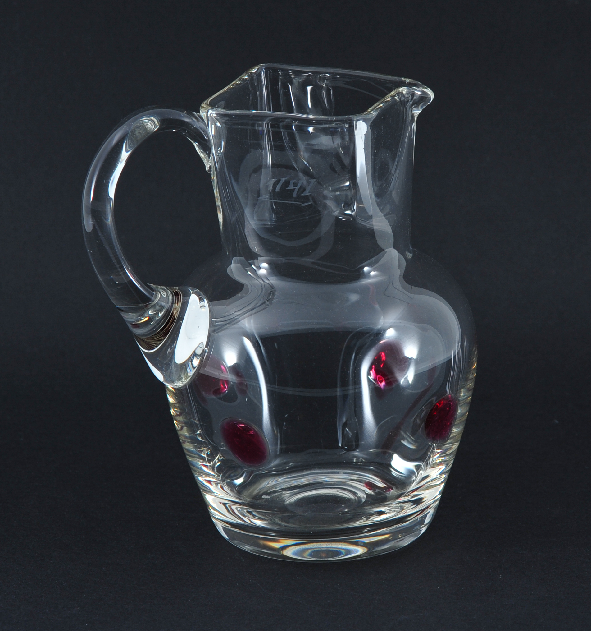 Objektfotografie in Styrobox: : Freiherr von Poschinger Glashütte: Weinkrug mit 1/4l Eichmarke, Anfang 20. Jahrhundert